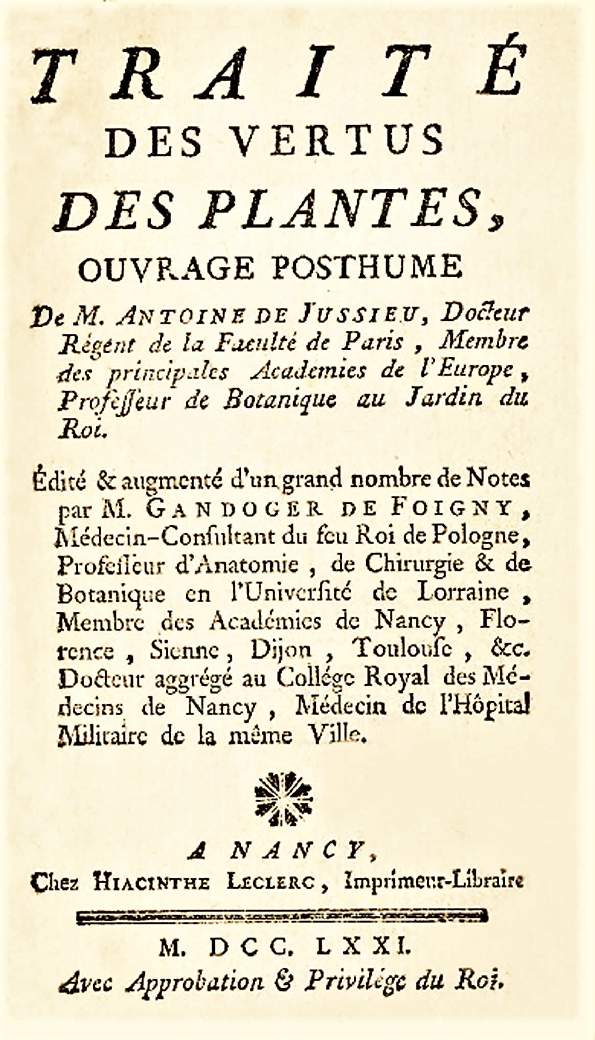 Traite des vertus desplantesvon Antoine de Jussieu (1686-1758)